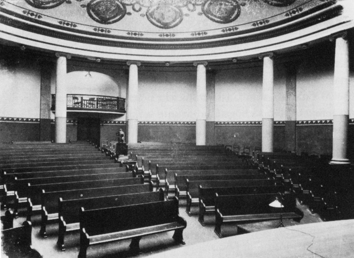 Cassels donation, salen vid tiden för invigningen 1900